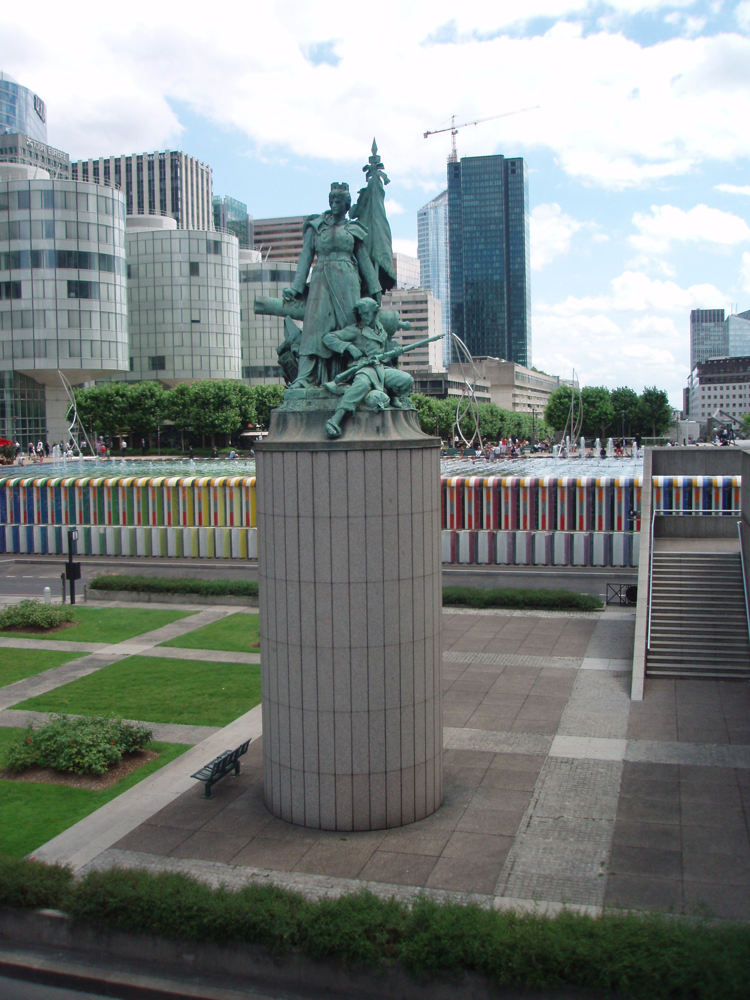 La Défense